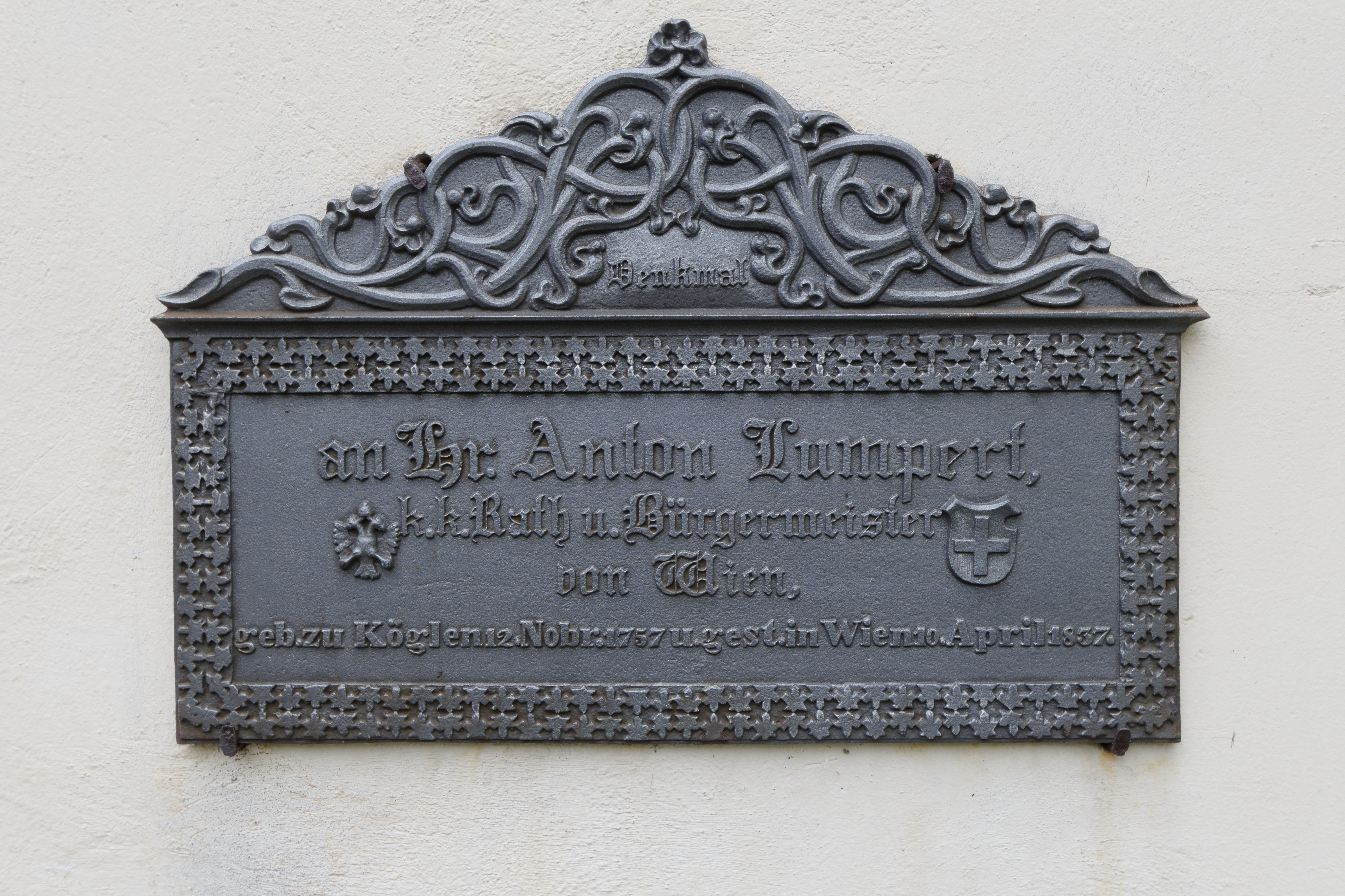 Elbigenalp, Denkmal Anton Lumpert